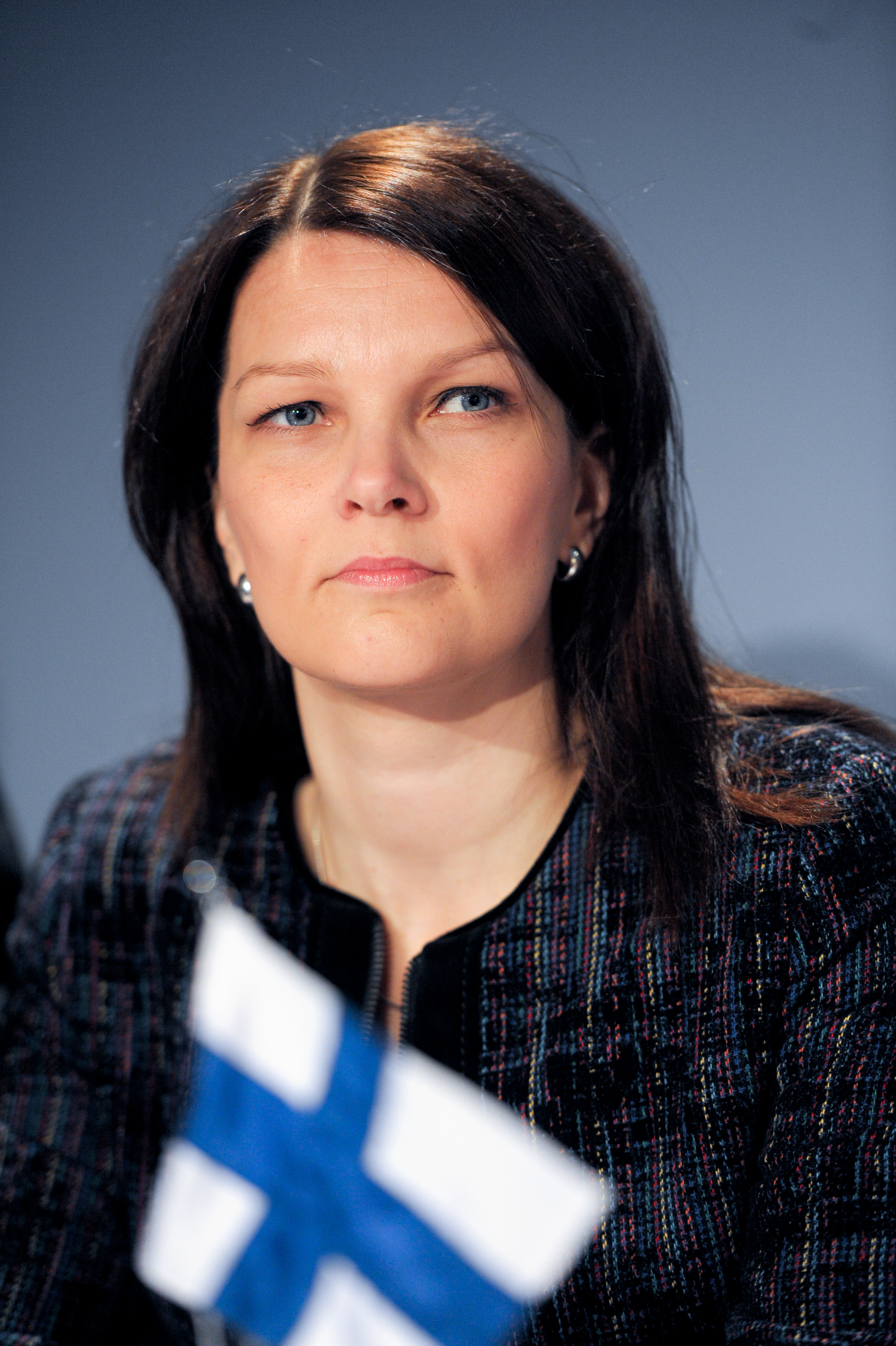 Finlands statsminister Mari Kiviniemi, Nordiska rådets session 201